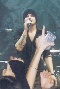 The Rasmus in concerto a Milano, 09/11/2005.